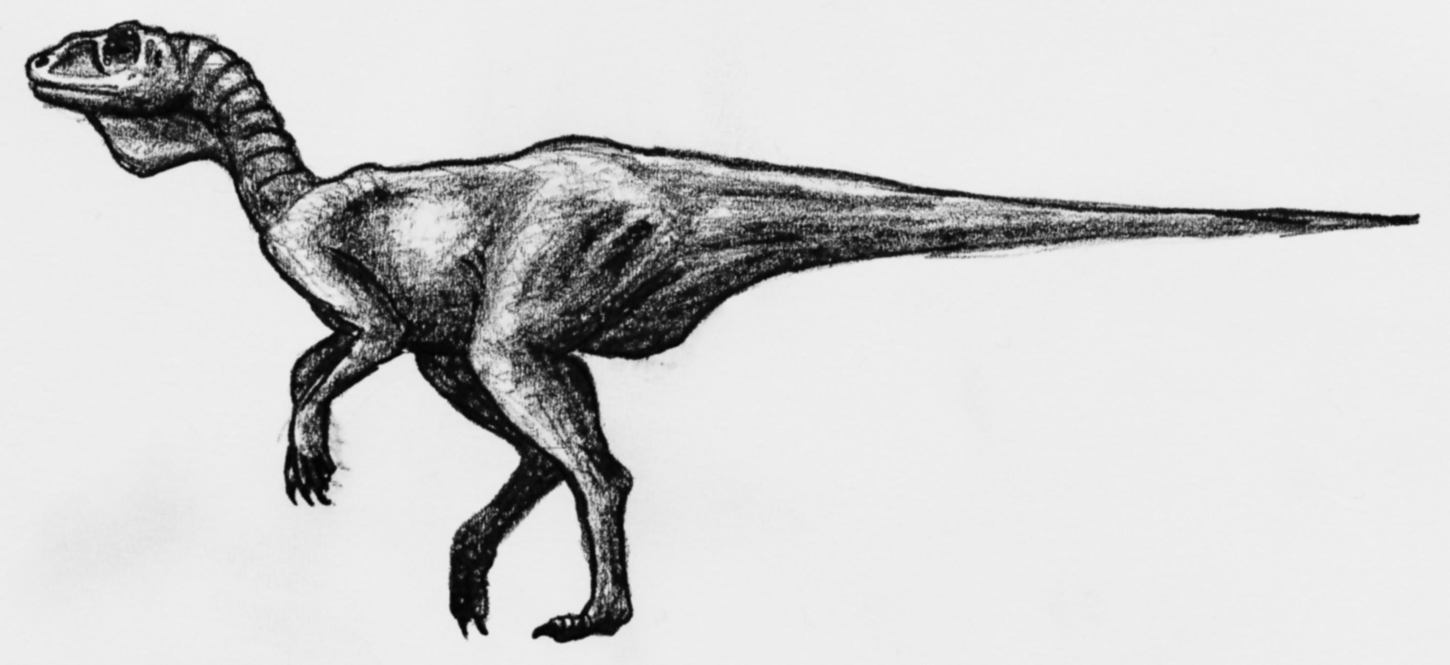 Chindesaurus